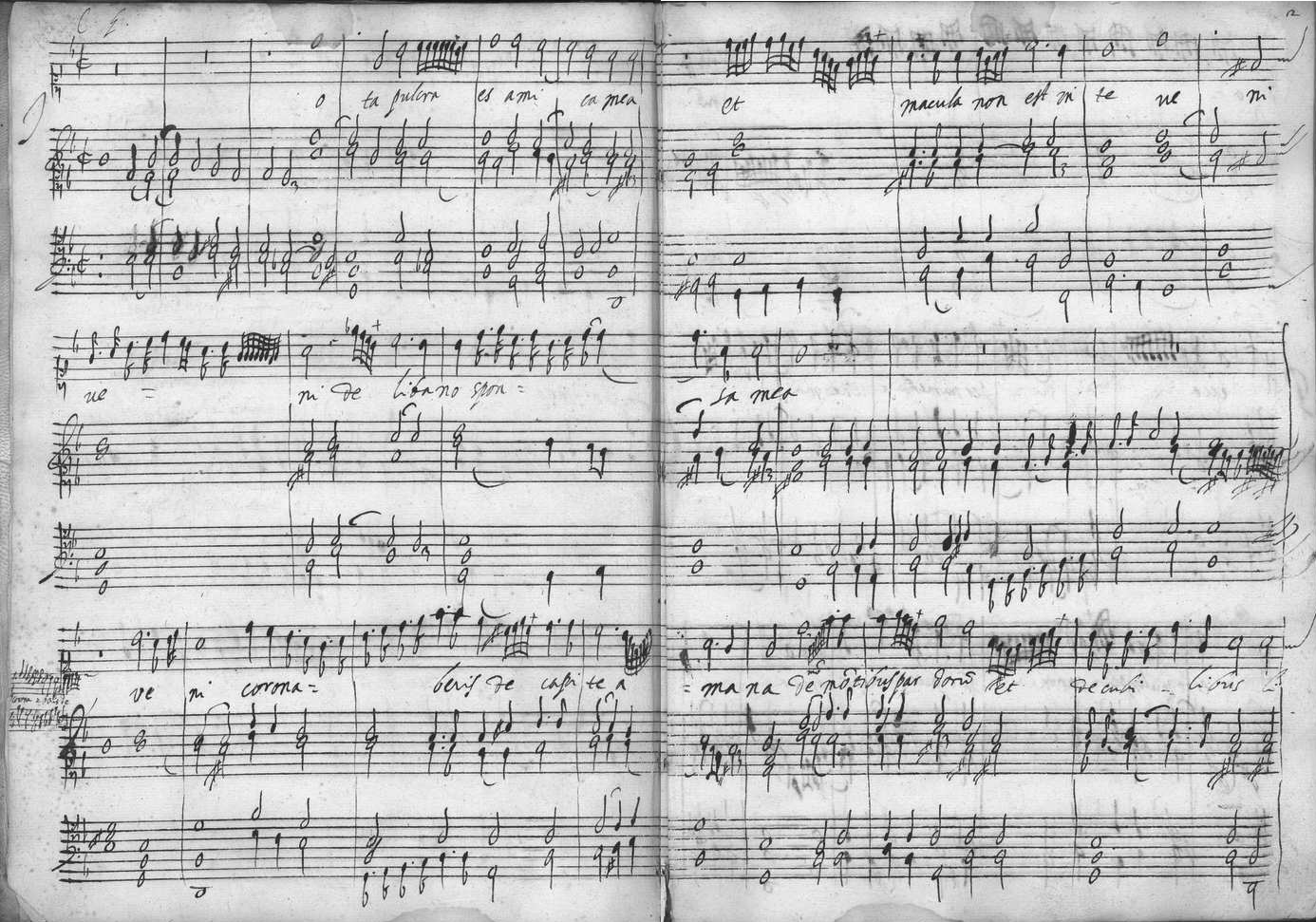 Tota Pulchra es, la première pièces du recueil du manuscrit Carlo G.